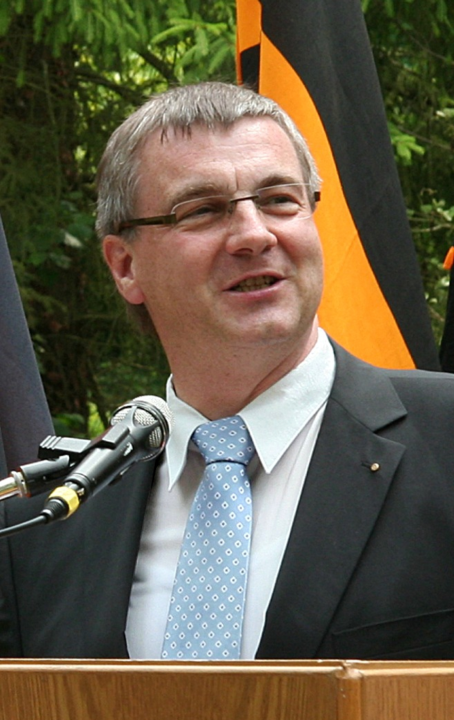 Landrat Dr. Alexander Saftig, Landkreis Mayen-Koblenz)